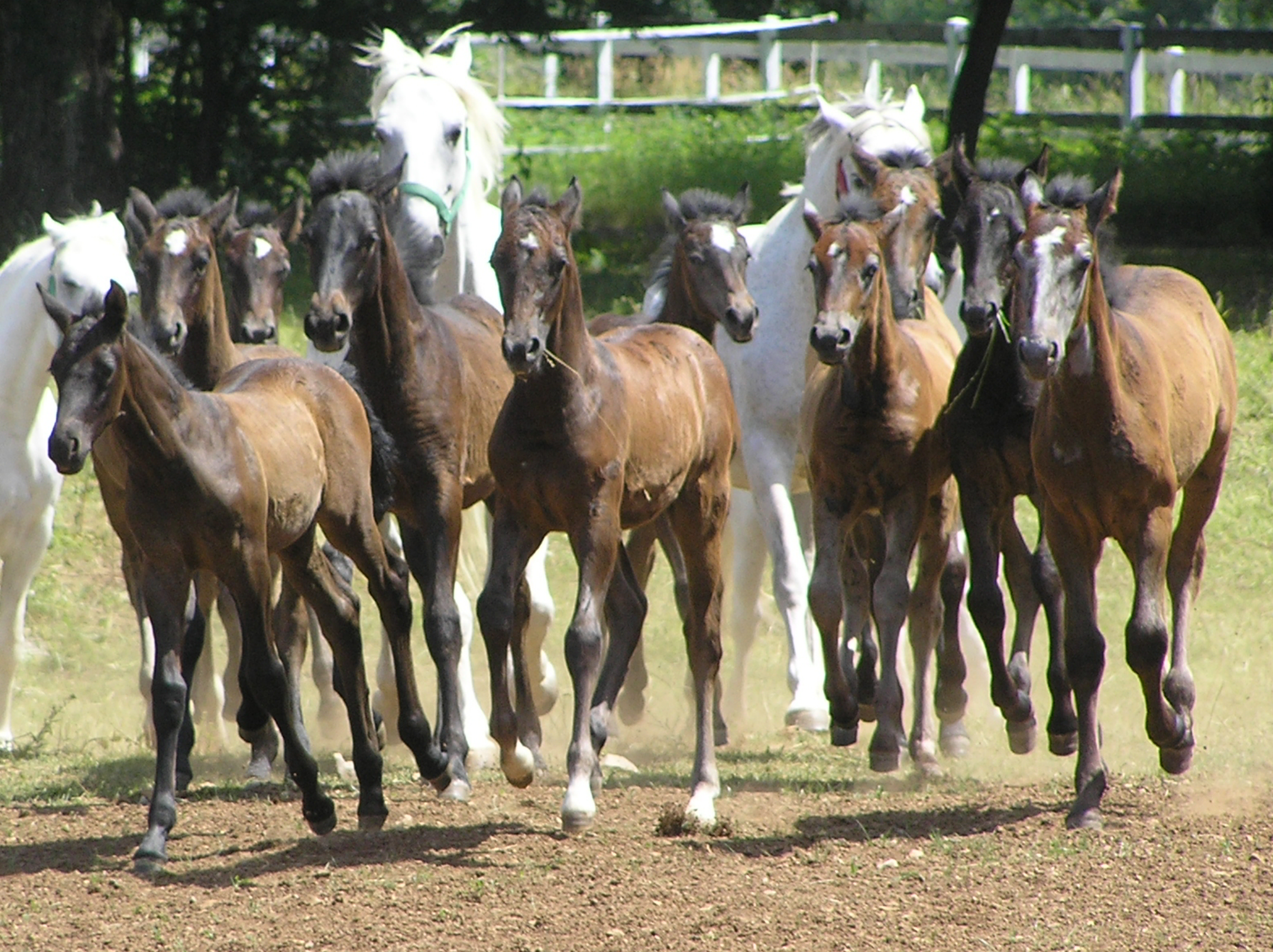 rondje van het huis